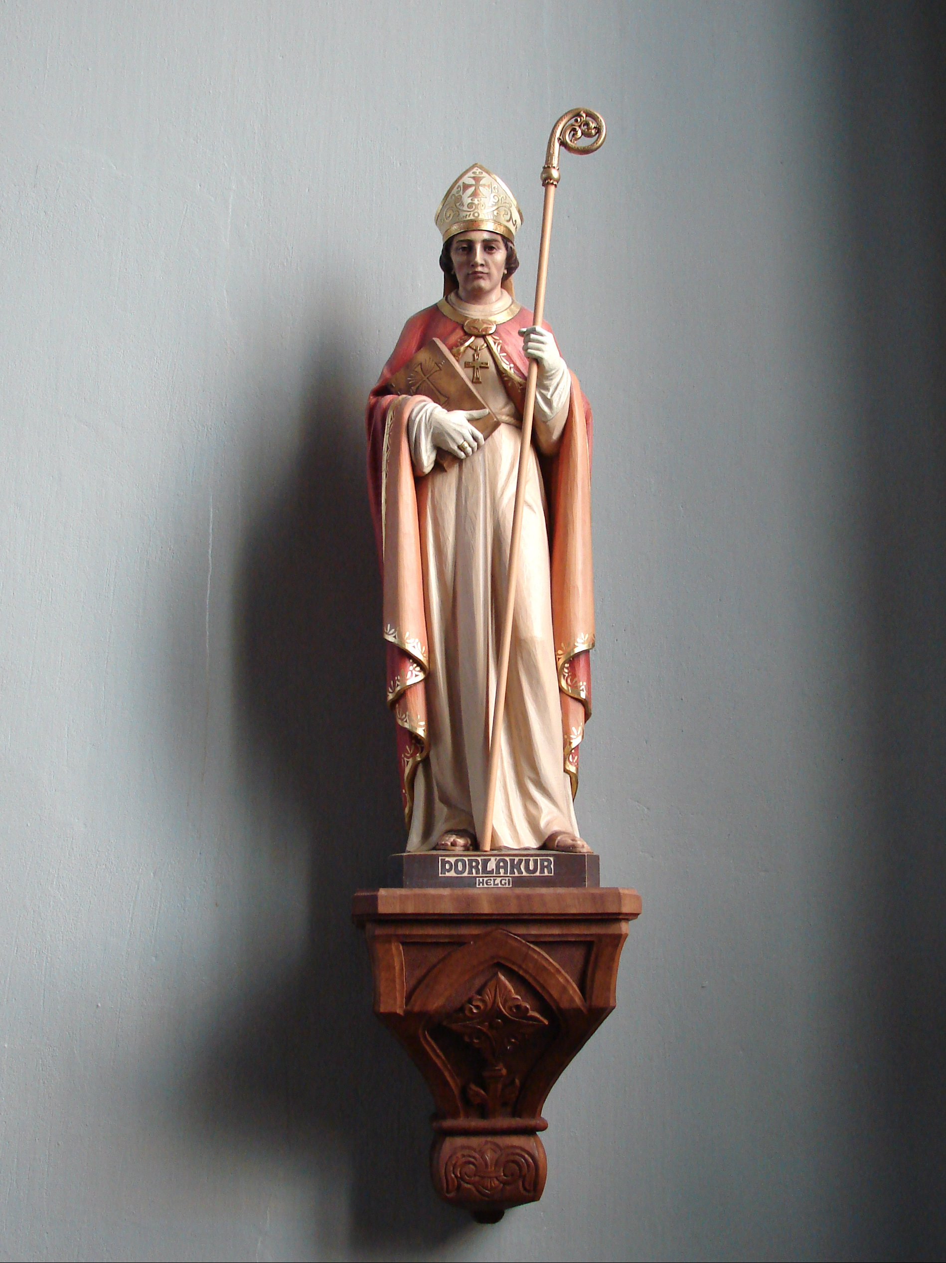 Helgenen Þorlákur Þórhallsson (Þorlákr, Thorlak, Torlak, Torlacus) i Den Katolske Kirke, Reykjavik i Island